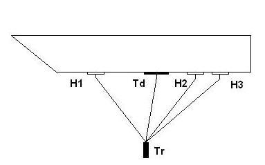 Principe SBL